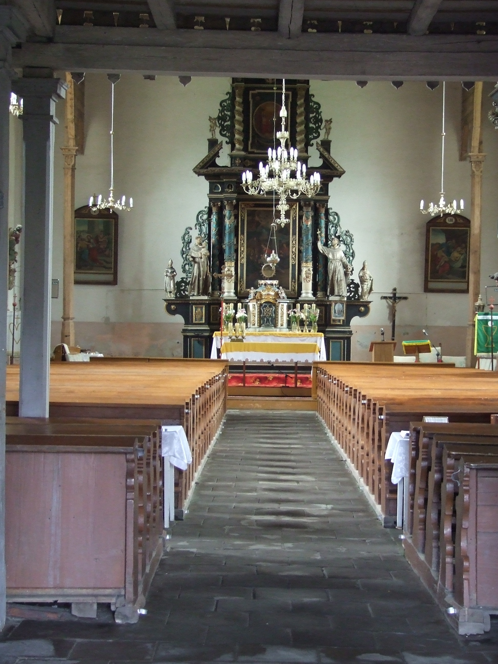 Hauptaltar der Kirche Maria Geburt - Okrzesyn